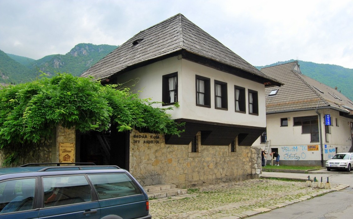 Rodna kuća Ive Andrića